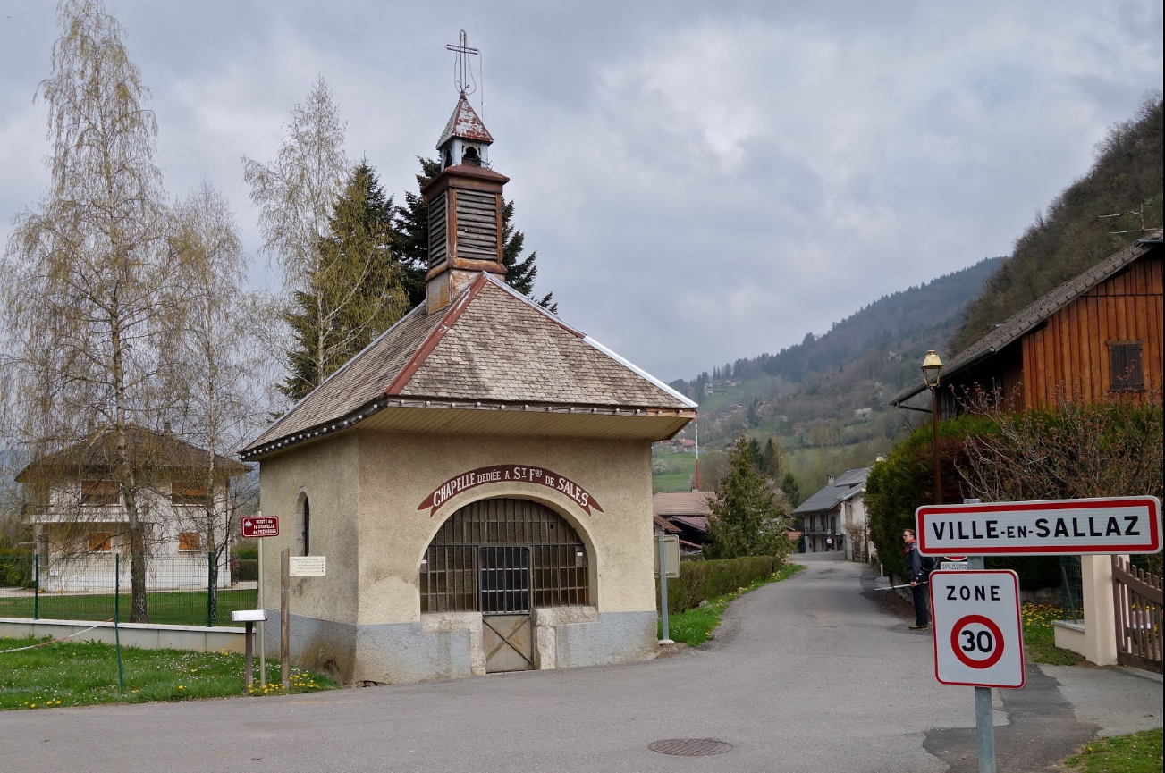 Chapelle de Prévières à l'entrée de Ville en Sallaz